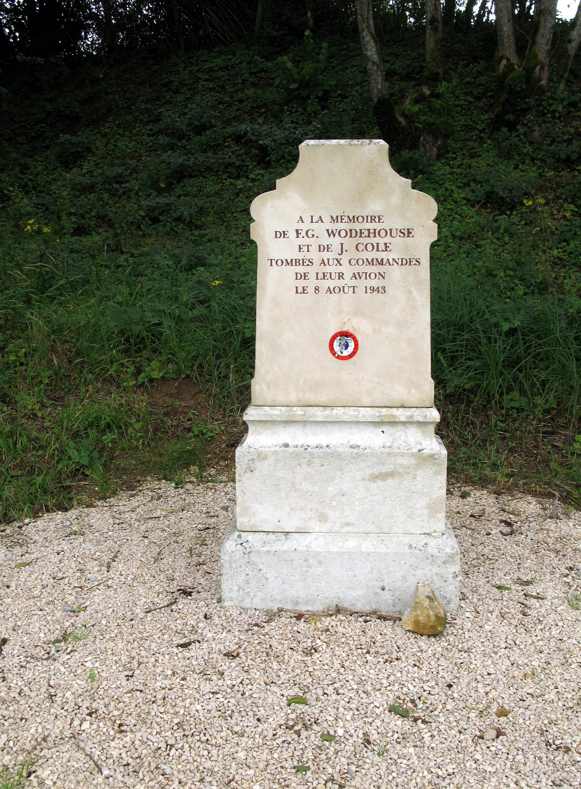 Vandenesse-en-Auxois (Côte-d'Or, France) - La stèle érigée en l'honneur des 2 aviateurs britanniques tués en 1943 se trouve au carrefour de la route départementale D977 avec celle menant à Châteauneuf. . .